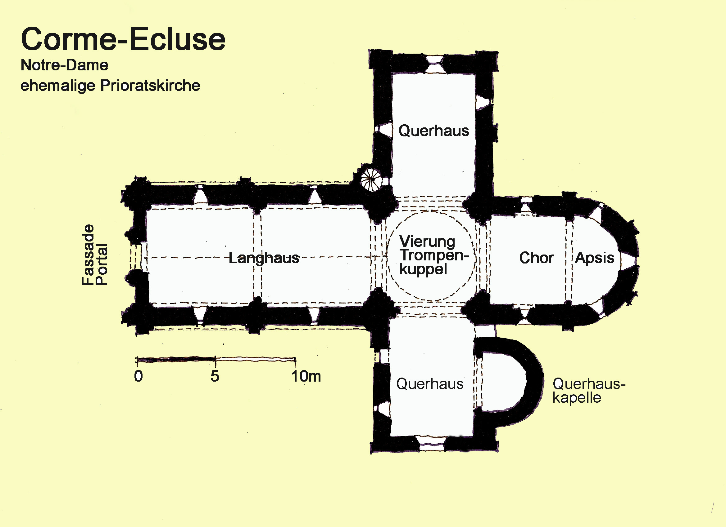 Corme-Écluse,_Grundriss, Handskizze